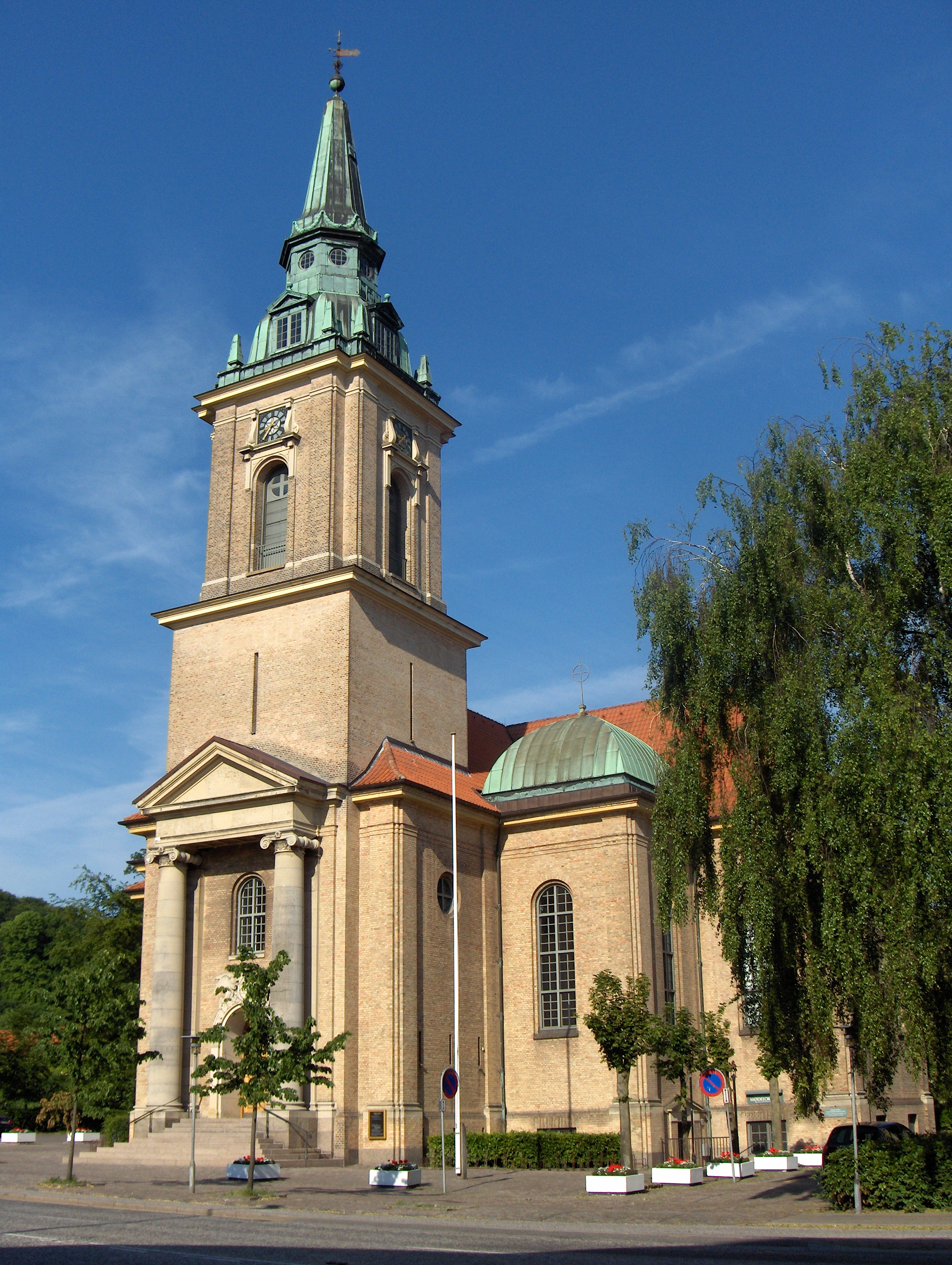 AnsgarKirke - Aalborg